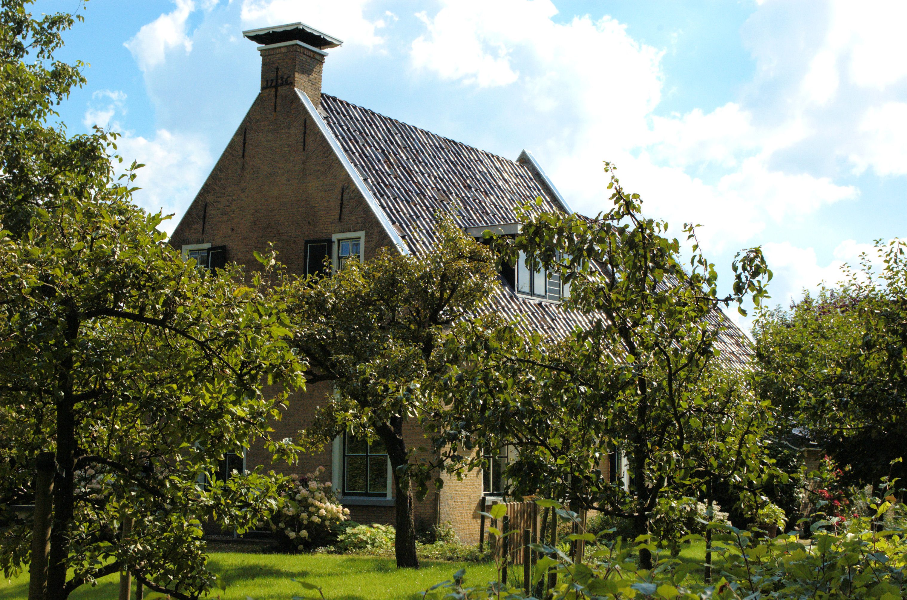 Voorhuis van boerderij, Molenweg 1 in Burgum